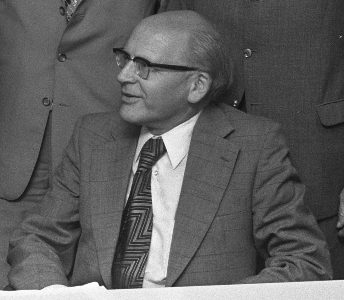 Collectie / Archief : Fotocollectie Anefo Reportage / Serie : [ onbekend ] Beschrijving : Parlementaire delegatie op Schiphol na bezoek aan Suriname nummer 12 drs. H. Fransen (kop) Datum : 24 juli 1973 Locatie : Noord-Holland, Schiphol Trefwoorden : bezoeken Fotograaf : Verhoeff, Bert / Anefo Auteursrechthebbende : Nationaal Archief Materiaalsoort : Negatief (zwart/wit) Nummer archiefinventaris : bekijk toegang 2.24.01.05 Bestanddeelnummer : 926-5654